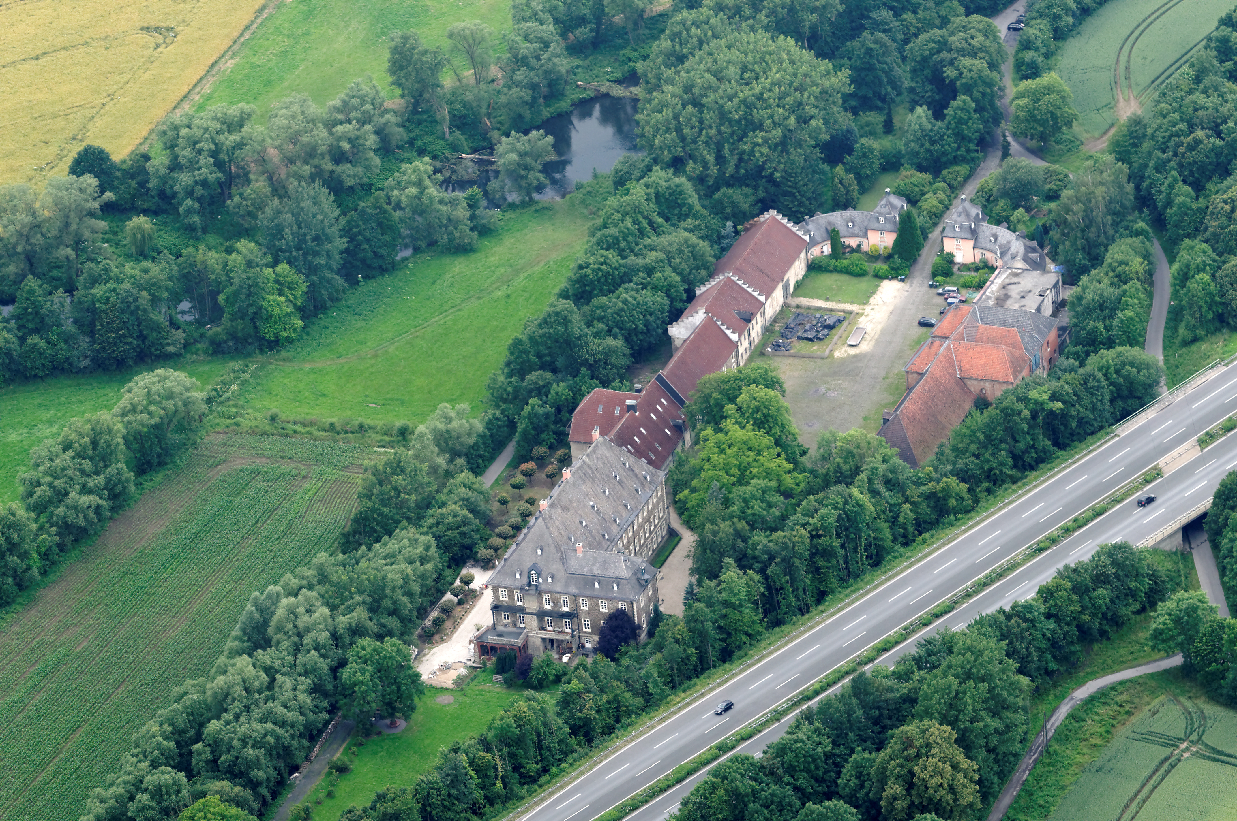 Fotoflug Sauerland Nord. Ense, Haus Füchten The making of this document was supported by the Community-Budget of Wikimedia Germany.